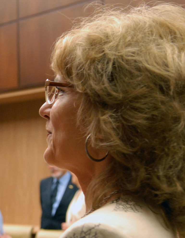 Cristina Fernández, mantuvo un encuentro con los directivos del CONICET, con motivo de cumplirse el 50º aniversario de su creación. Presentó la nueva titular del organismo, Marta Rovira.